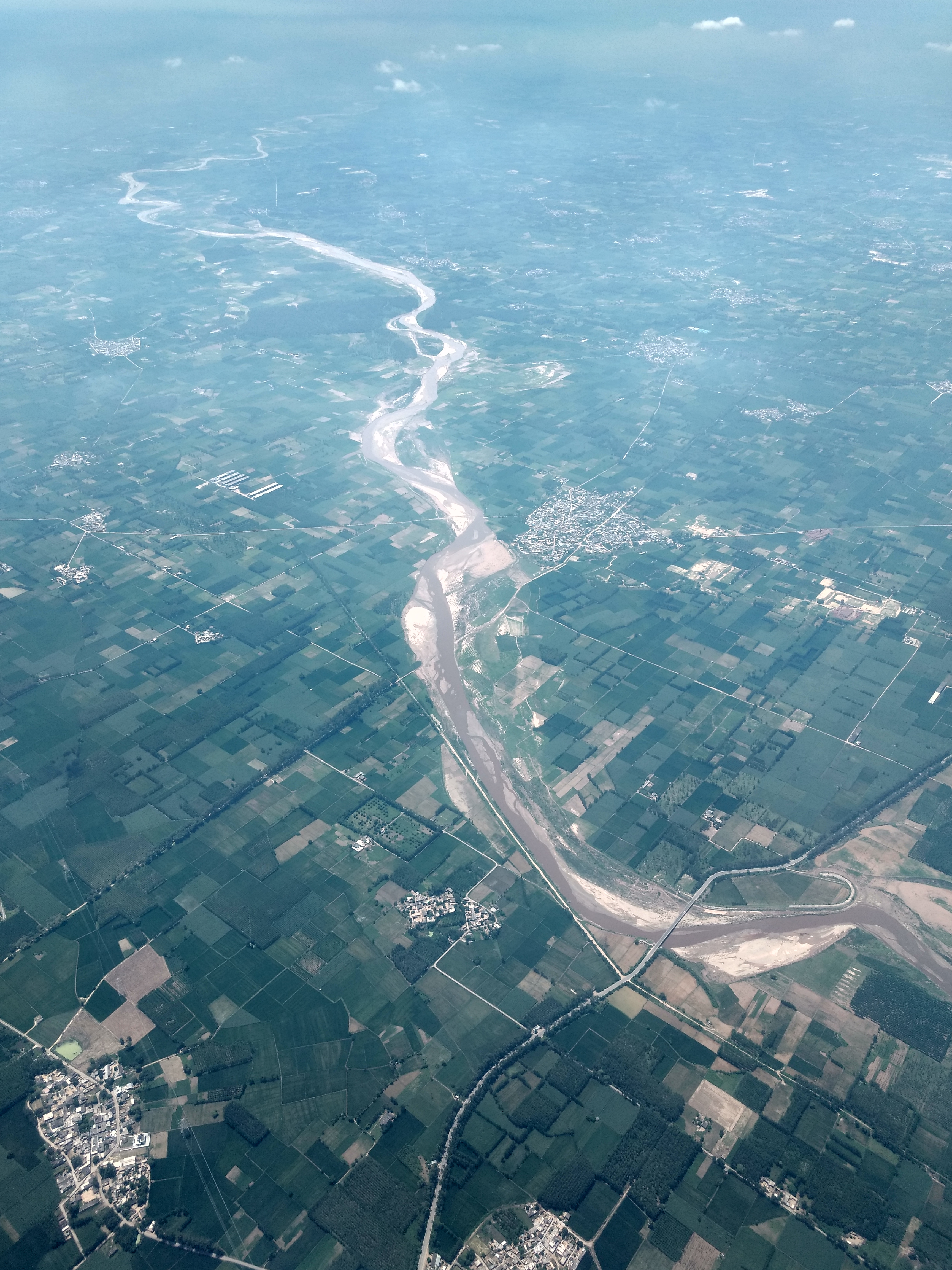 river ghaggar near chandigarh